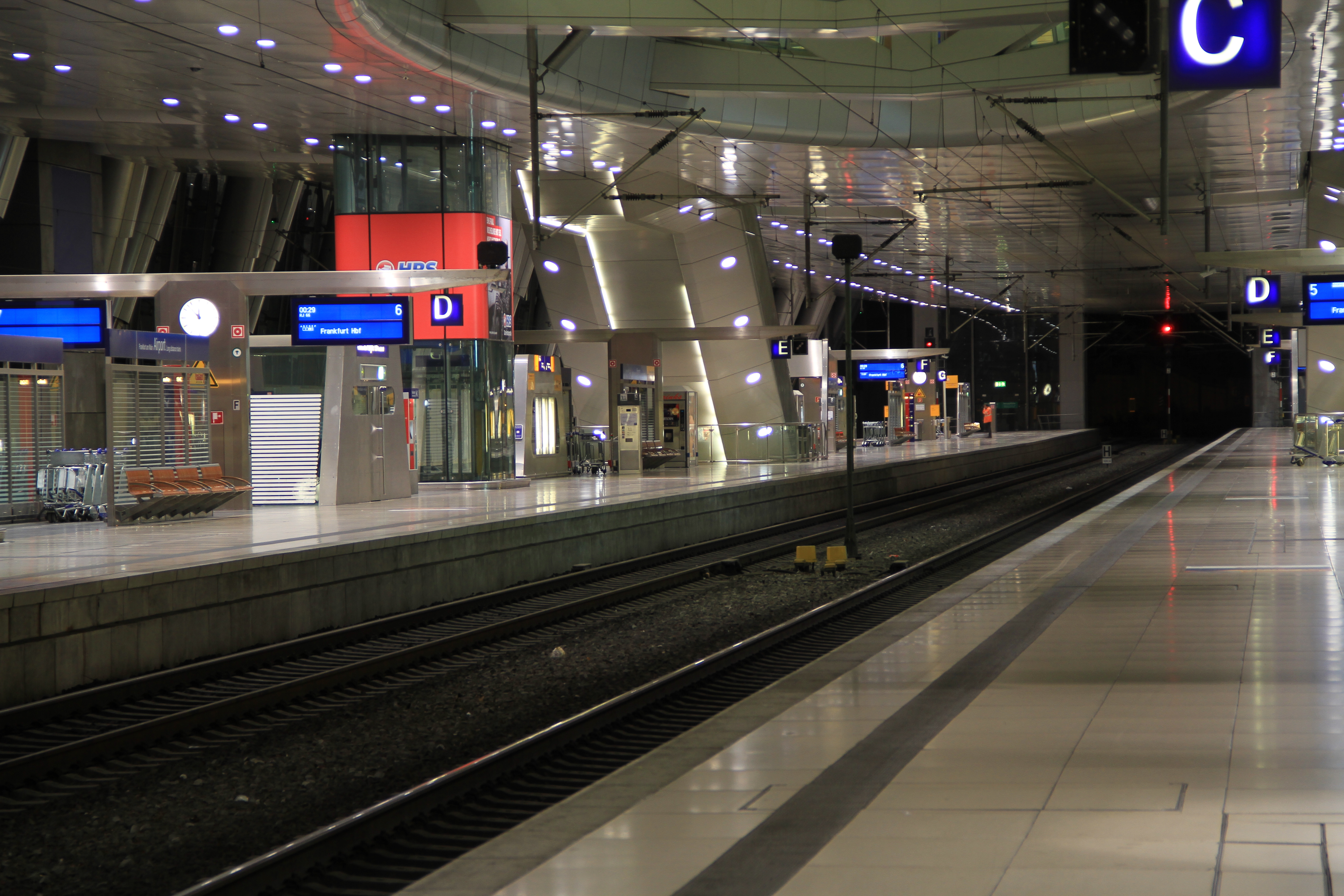 Mittelbahnsteig des Fernbahnhofes am Frankfurter Flughafen